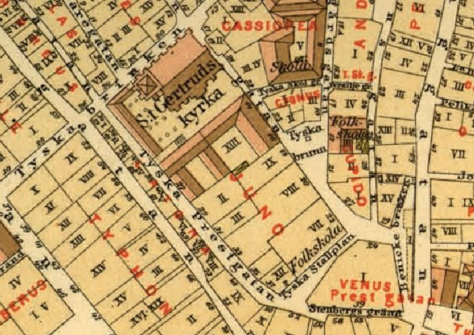 Kvarteren Juno, Venus, Cupido m.fl. på Lundgrens karta över Stockholm år 1885